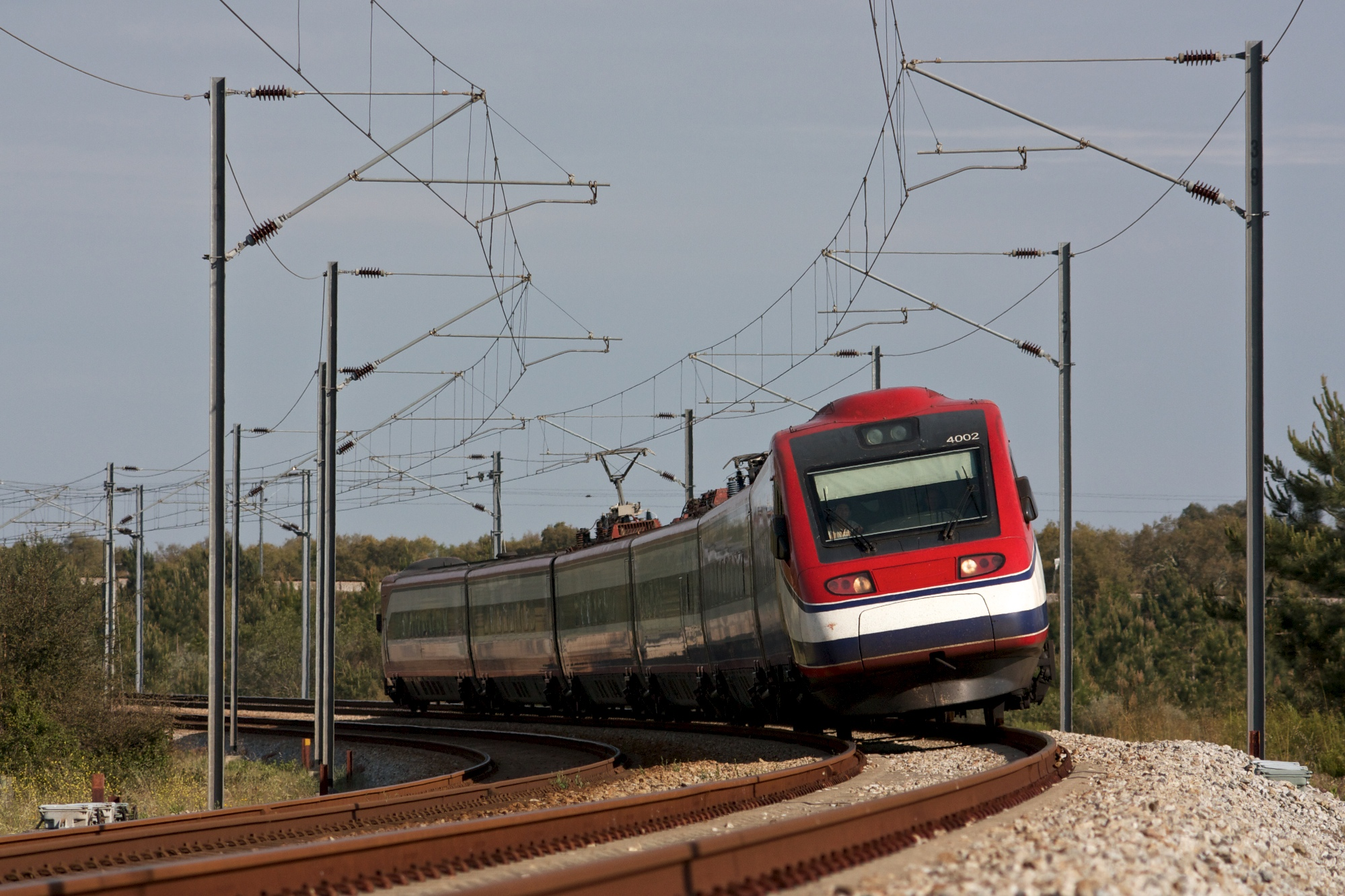 Tipo: Comboio Alfa Pendular 180 [Porto • Campanhã - Faro] Local: Poceirão [Concordância de Poceirão, PK 1] Data e hora: 30 de Abril de 2013 [09h13] Material: Automotora 4002 [Comboio de Pendulação Activa]